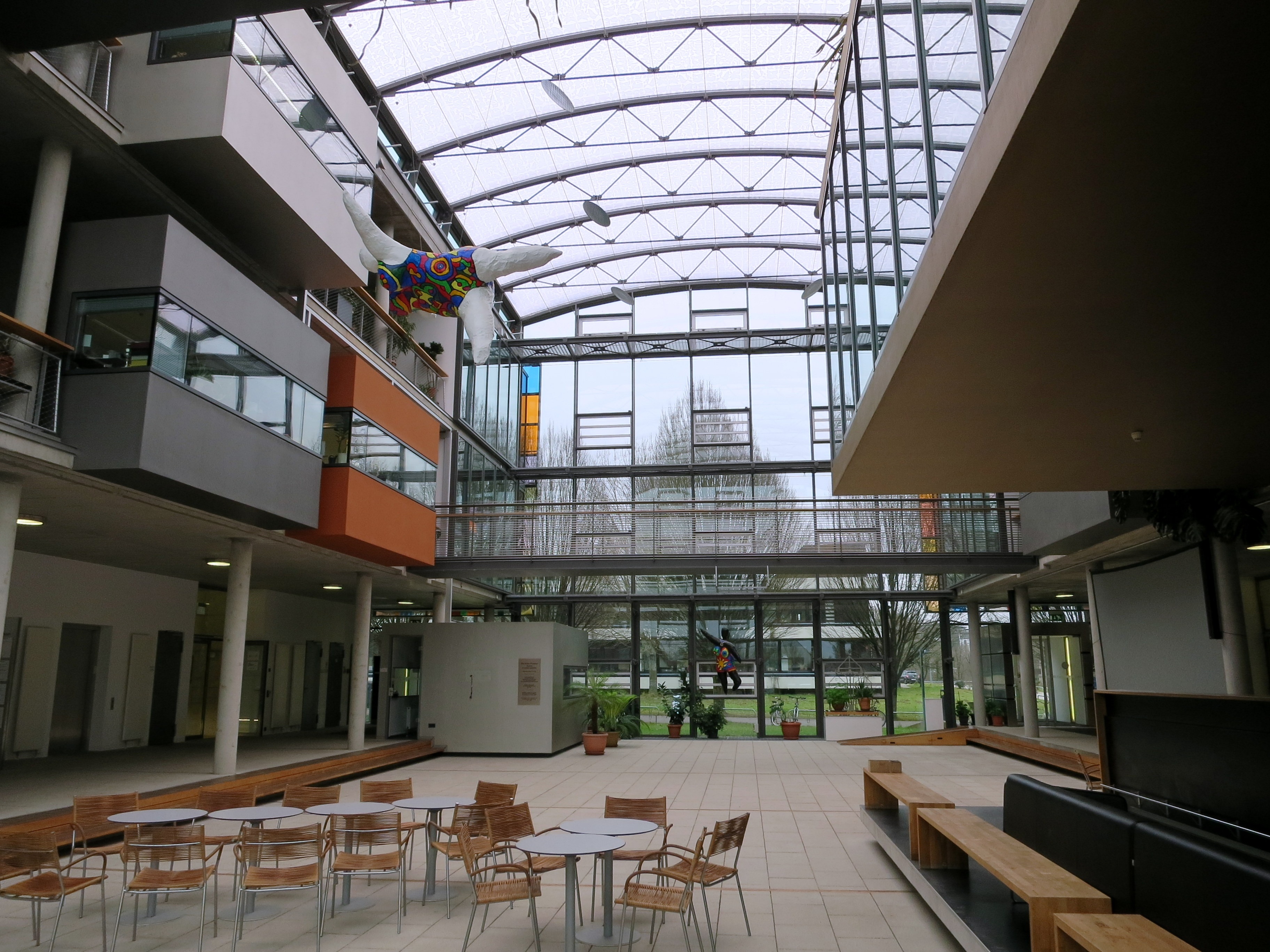 Diese verglaste Halle verbindet zwei gleich Labor- und Institutsbauten